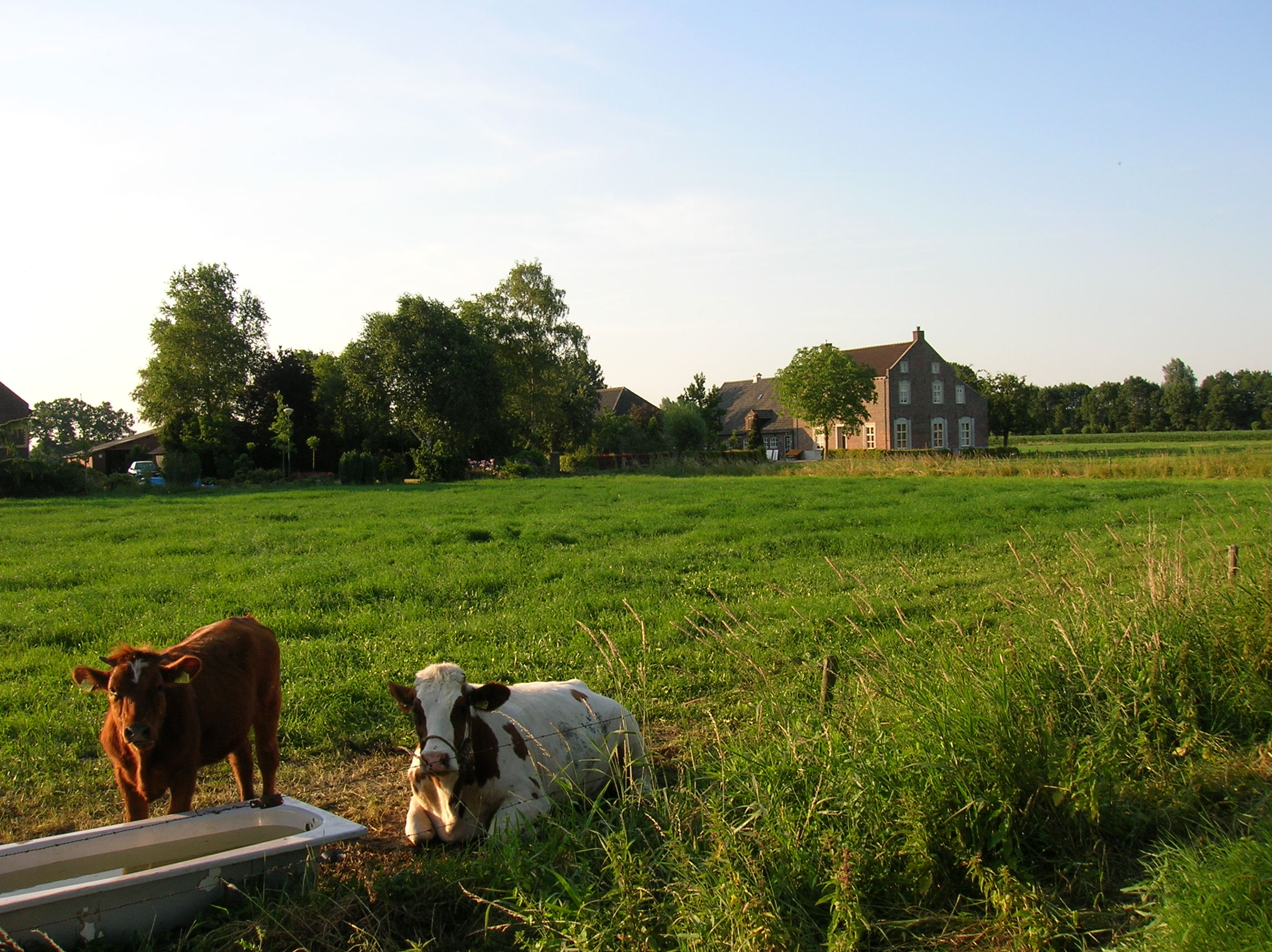 Zelfgemaakte foto